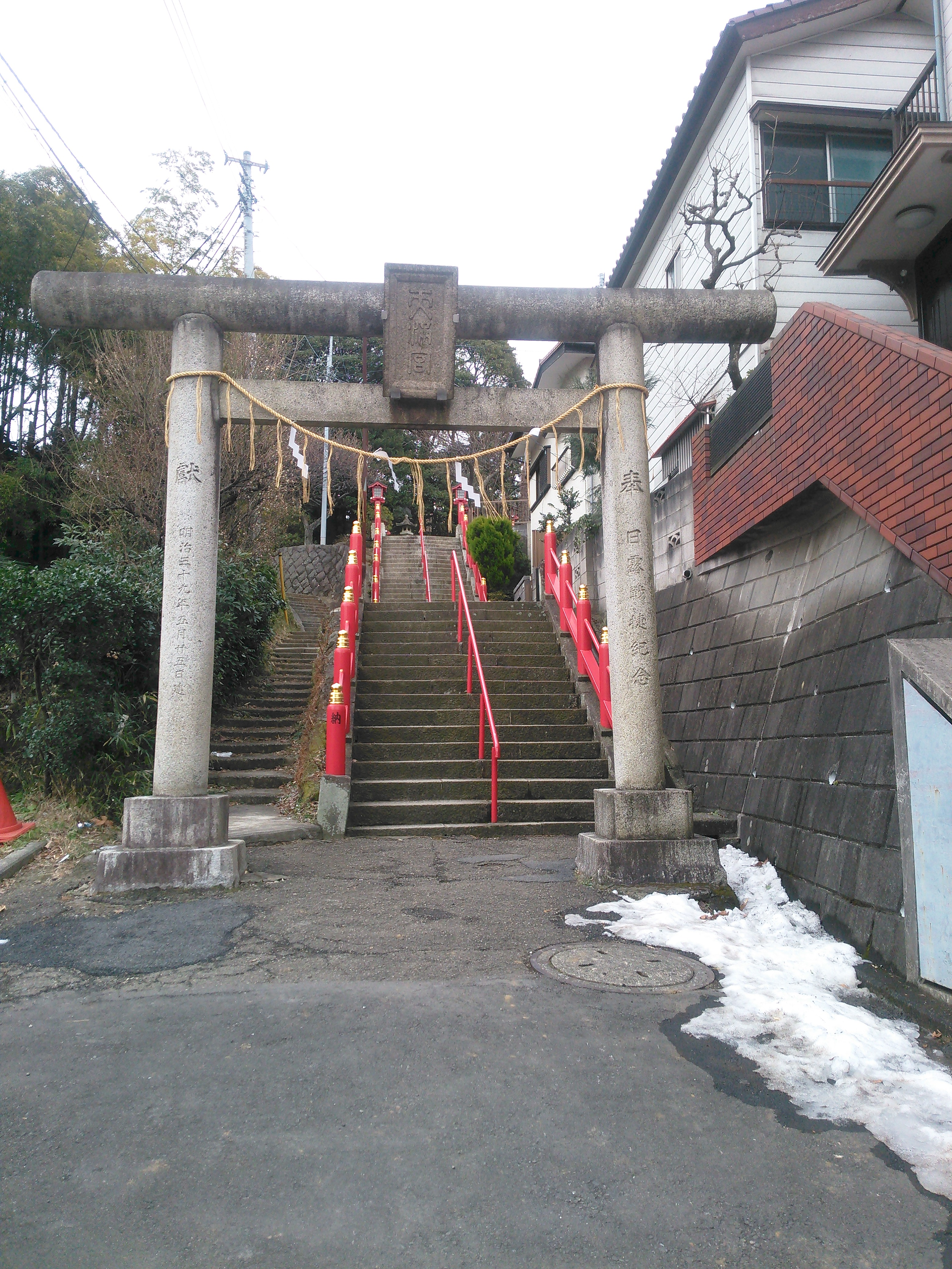 横浜市磯子区岡村、岡村天満宮入口、二の鳥居